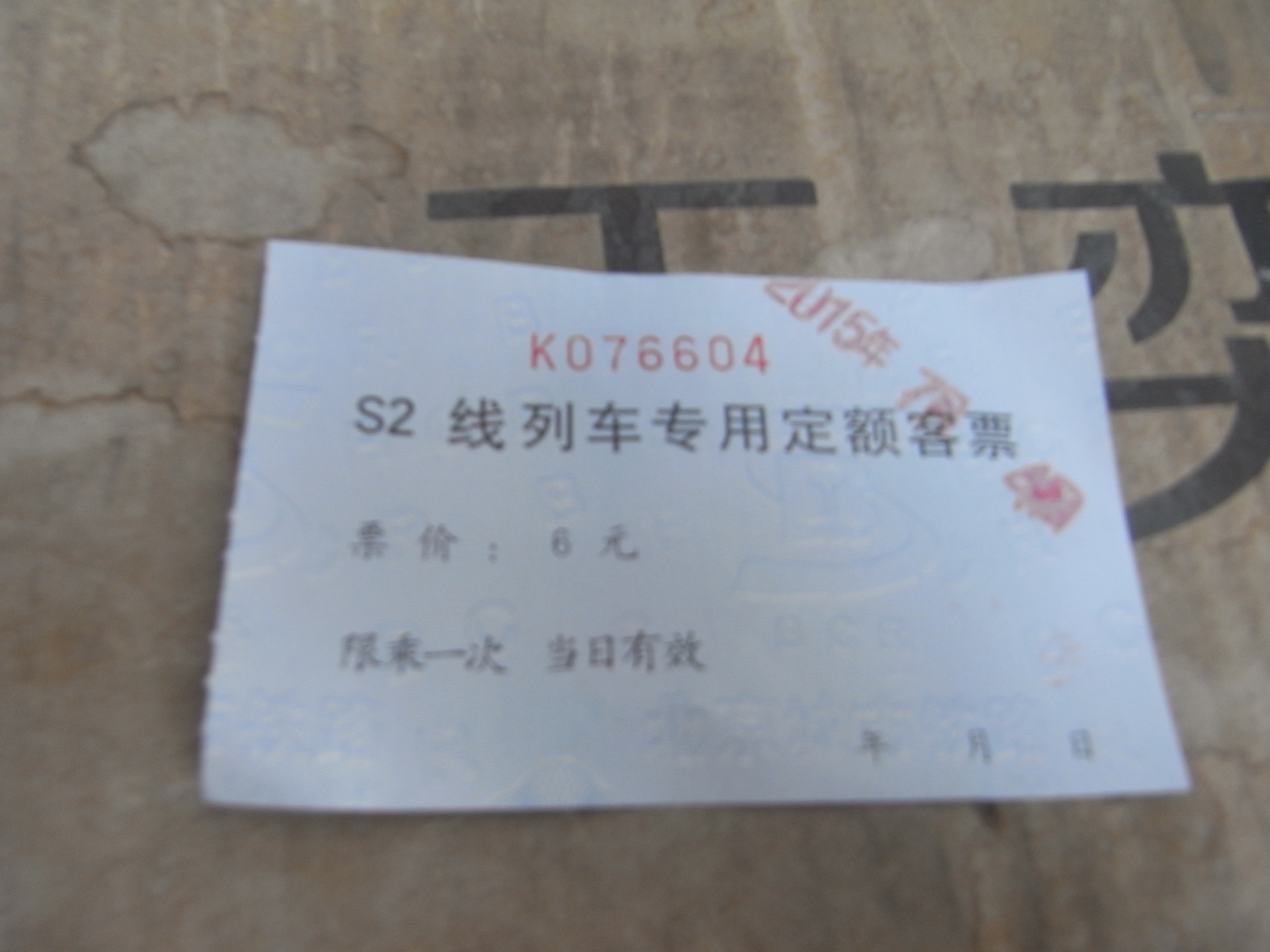 S2线专用定额客票（2017年12月前）